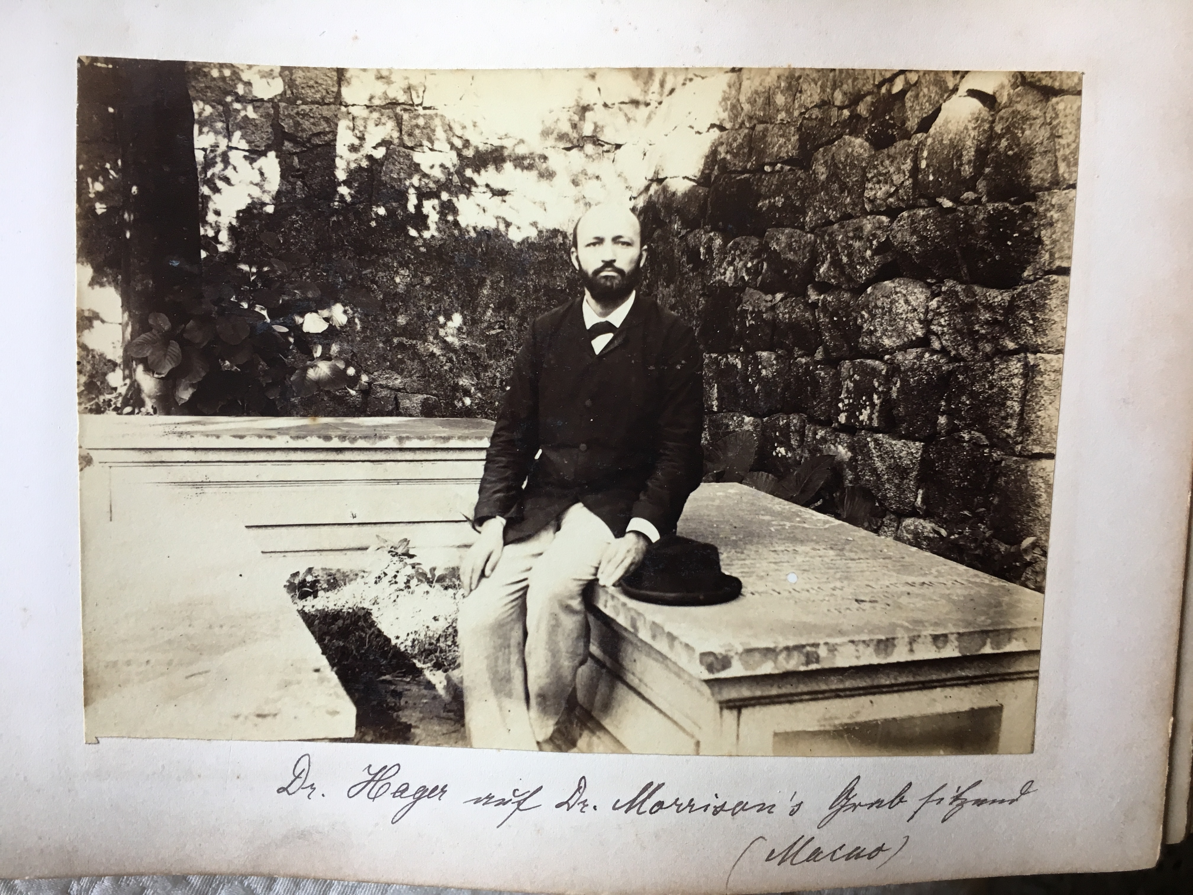 Rev. Dr. C. R. Hager at Dr. Robert Morrison's graveyard, Macao